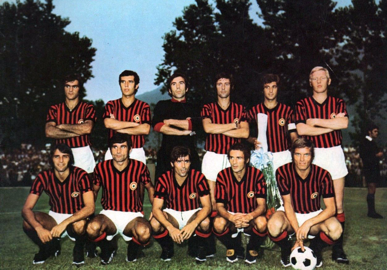 Una formazione del Milan nella stagione 1972-73.